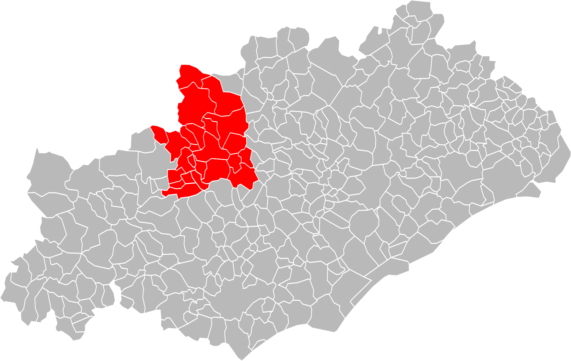 Localisation de la communauté de communes Grand Orb dans le département de l'Hérault